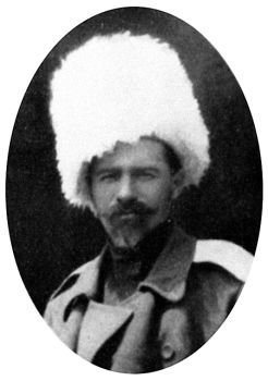 Ггенерал-лейтенант Сергей Марков в белой папахе, в которой он прославился в Добровольческой армии. Снимок неизвестного автора, сделанный 1917 или 1918 году